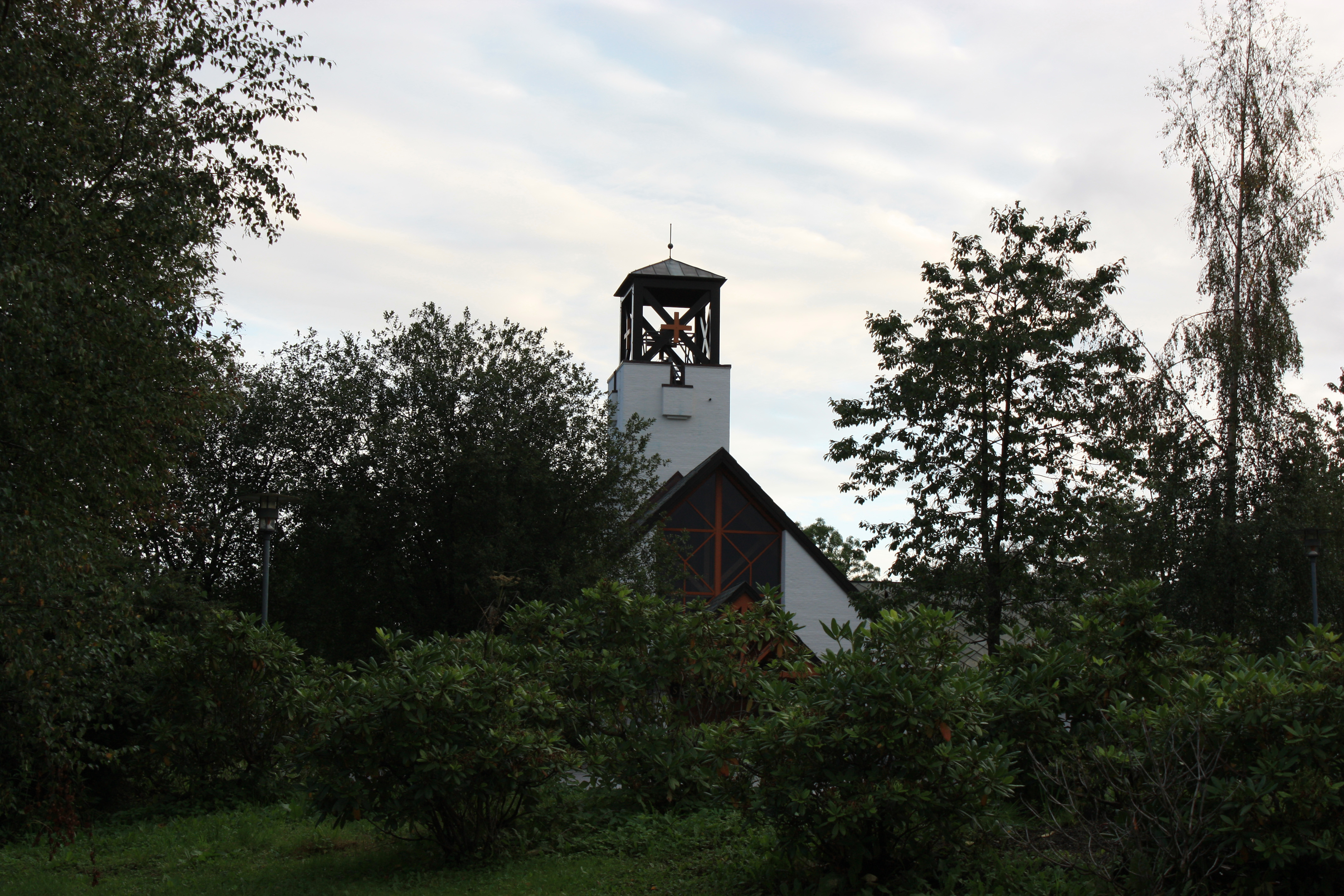 Skjold kirke, Fana, Bergen.